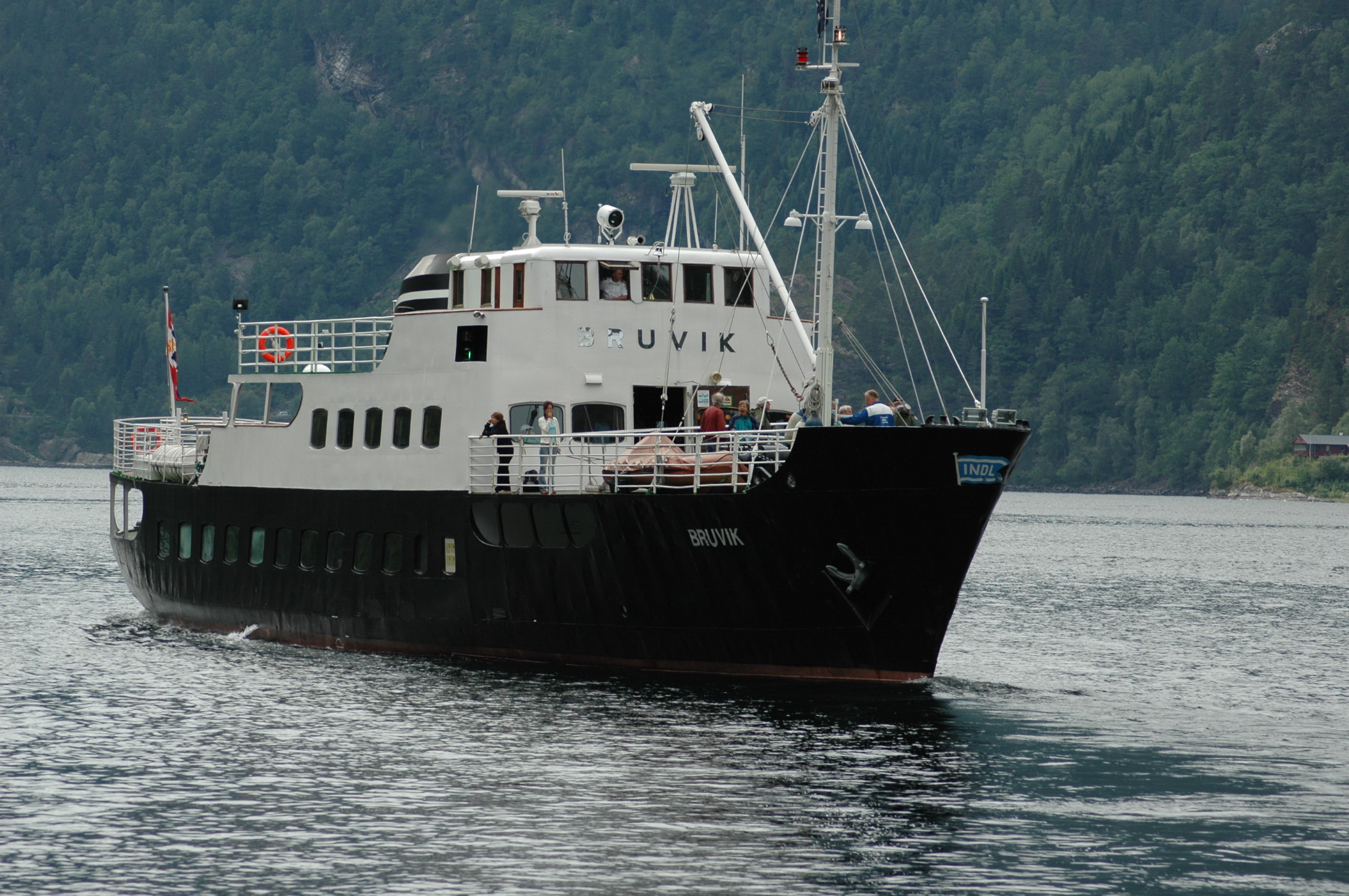 MS Bruvik på Mofjorden